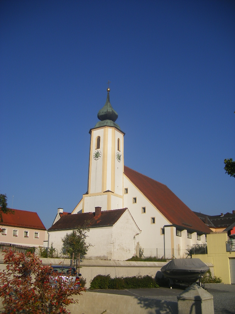 Windorf